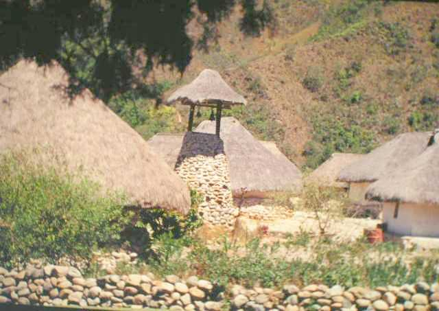 Dorf der Arhuacos in der SierraNevada de Santa Marta, Nabusimake